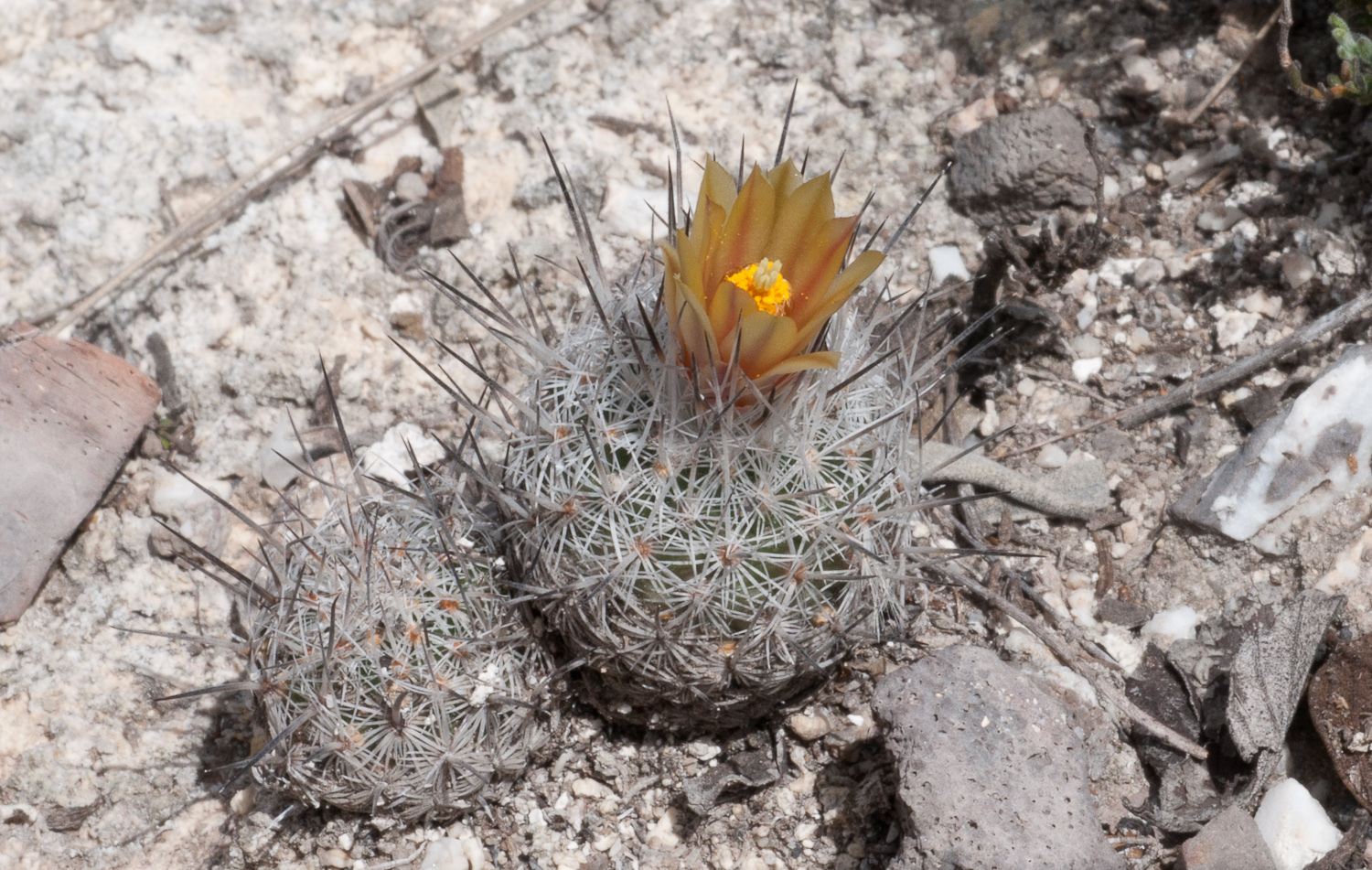 Dieser Kaktus wächst in der Nähe der kleinen Stadt Zaragoza in Nuevo Leon auf Gipsbergen.